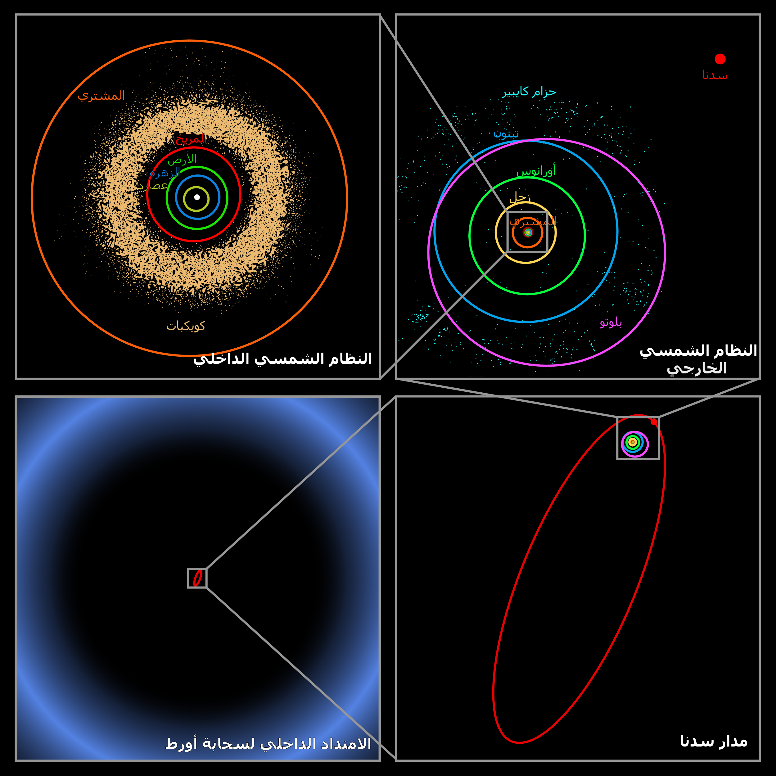 تُظهر هذه الكواكب الأربعة موقع الجرم وراء النبتوني 90377 سدنا، الذي يققع في أقاصي المجموعة الشمسية.[1]